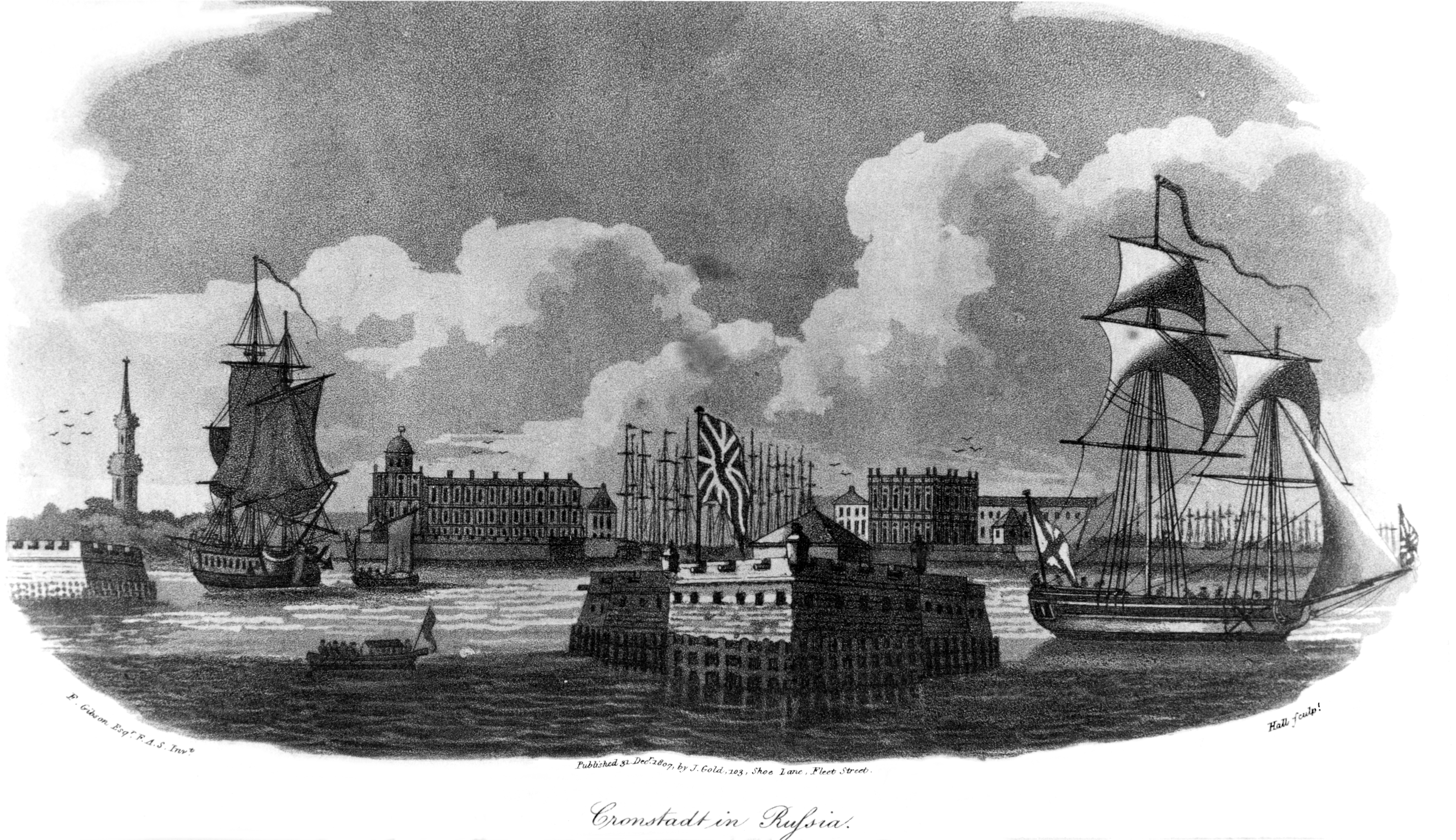 Cronstadt in Russia